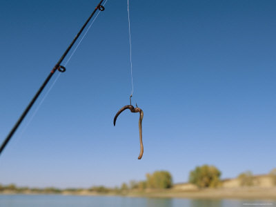 Minhoca sendo usada como isca em anzol para pescaria.